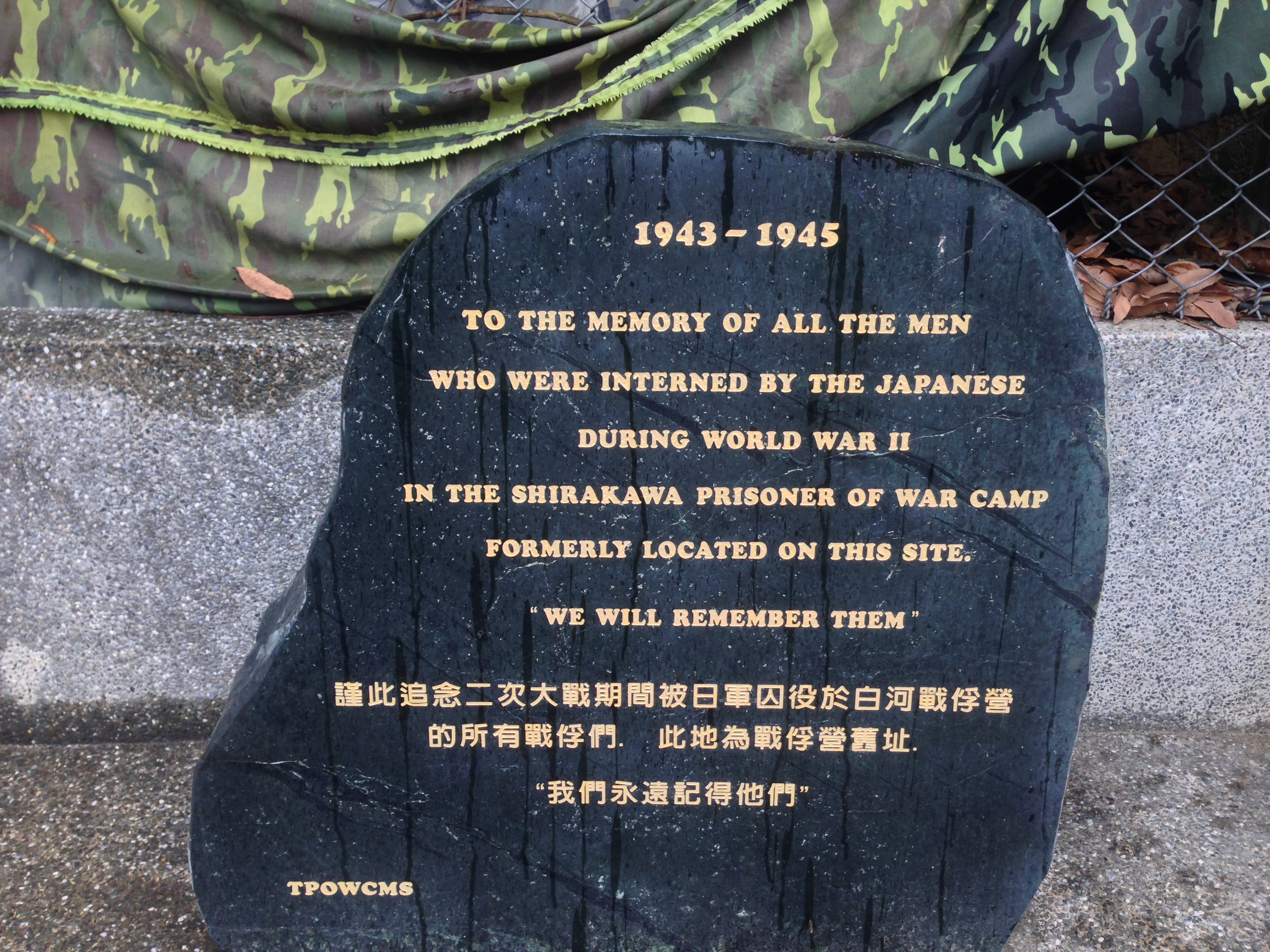 中文（台灣）: 白河內角營區的戰俘紀念碑